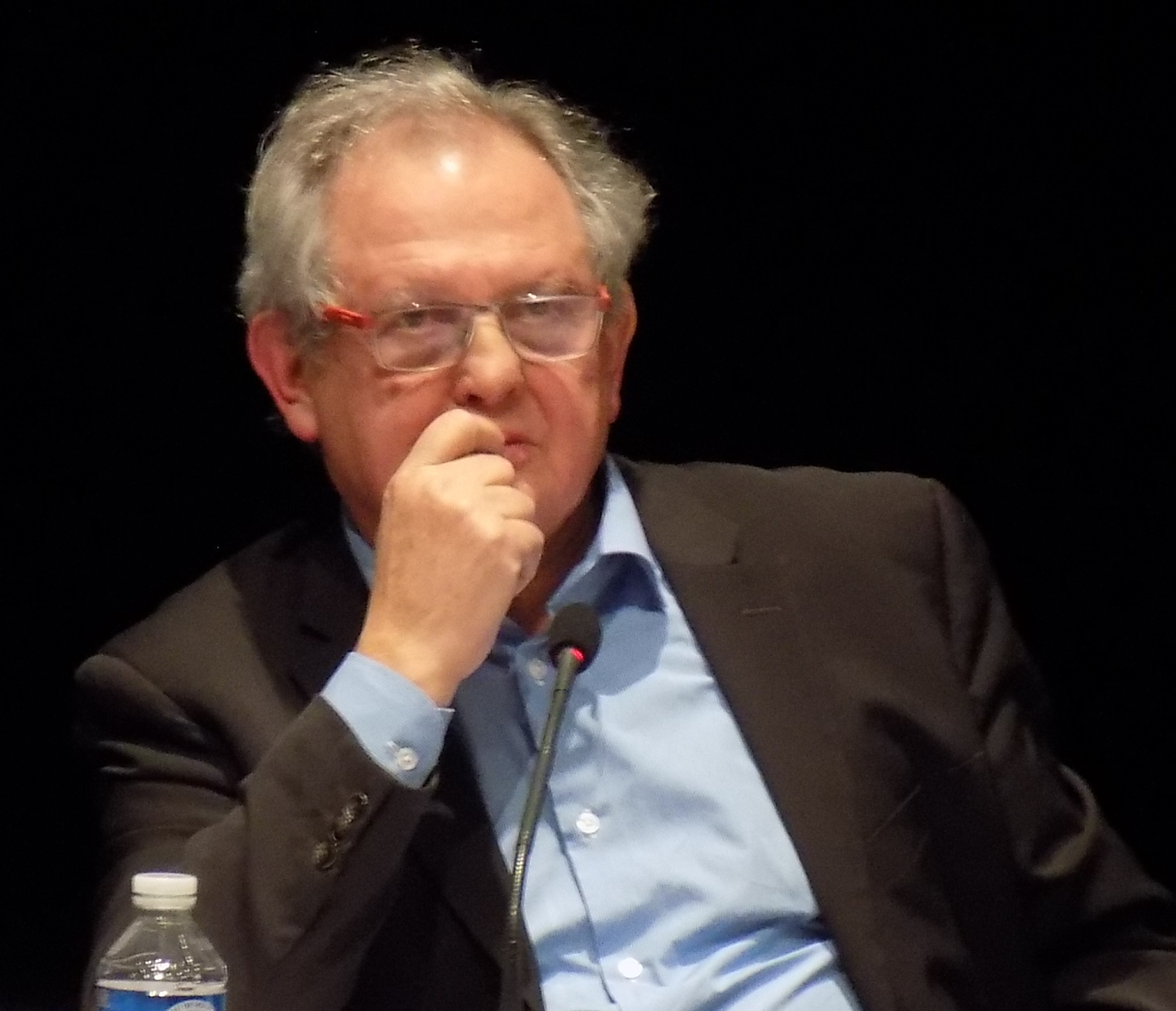 Jean-Yves Le Déaut lors de la 25e édition de la semaine de la science à Saint-Michel-sur-Orge